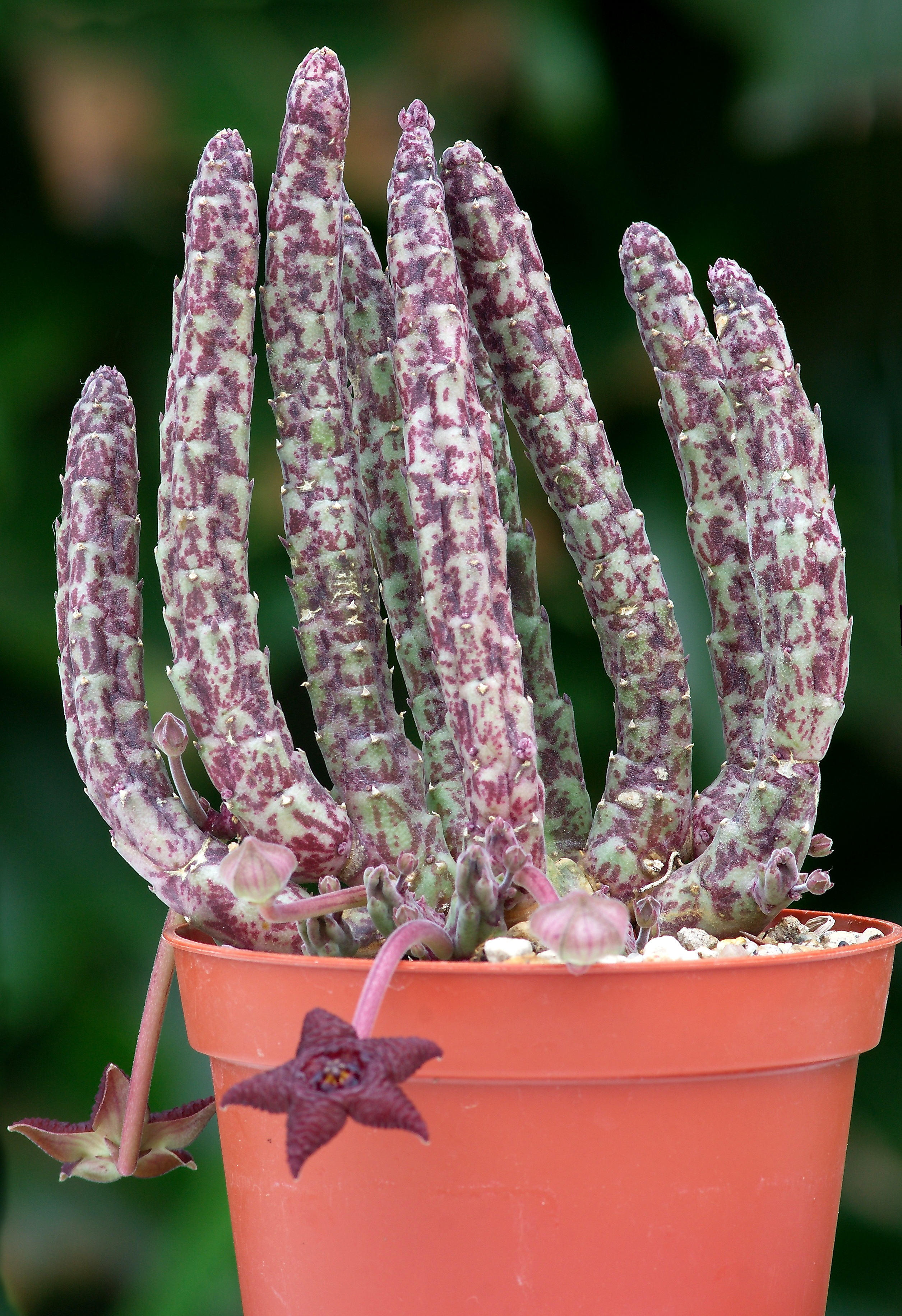 Canon FD 200mm f/4 S.S.C. an EOS (Adapter ohne Linse) - Fokussieren auf unendlich nicht möglich - also nur begrenzt als Makro verwendbar.